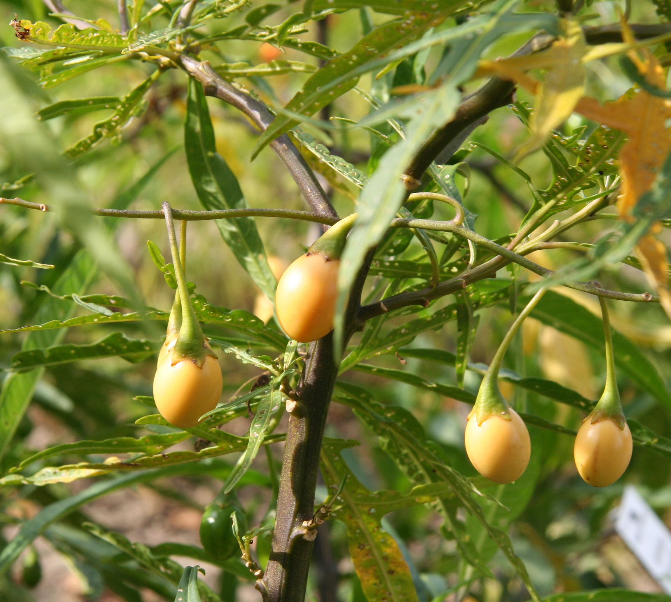 reife Früchte an Solanum laciniatum im Botanischen Garten Dresden